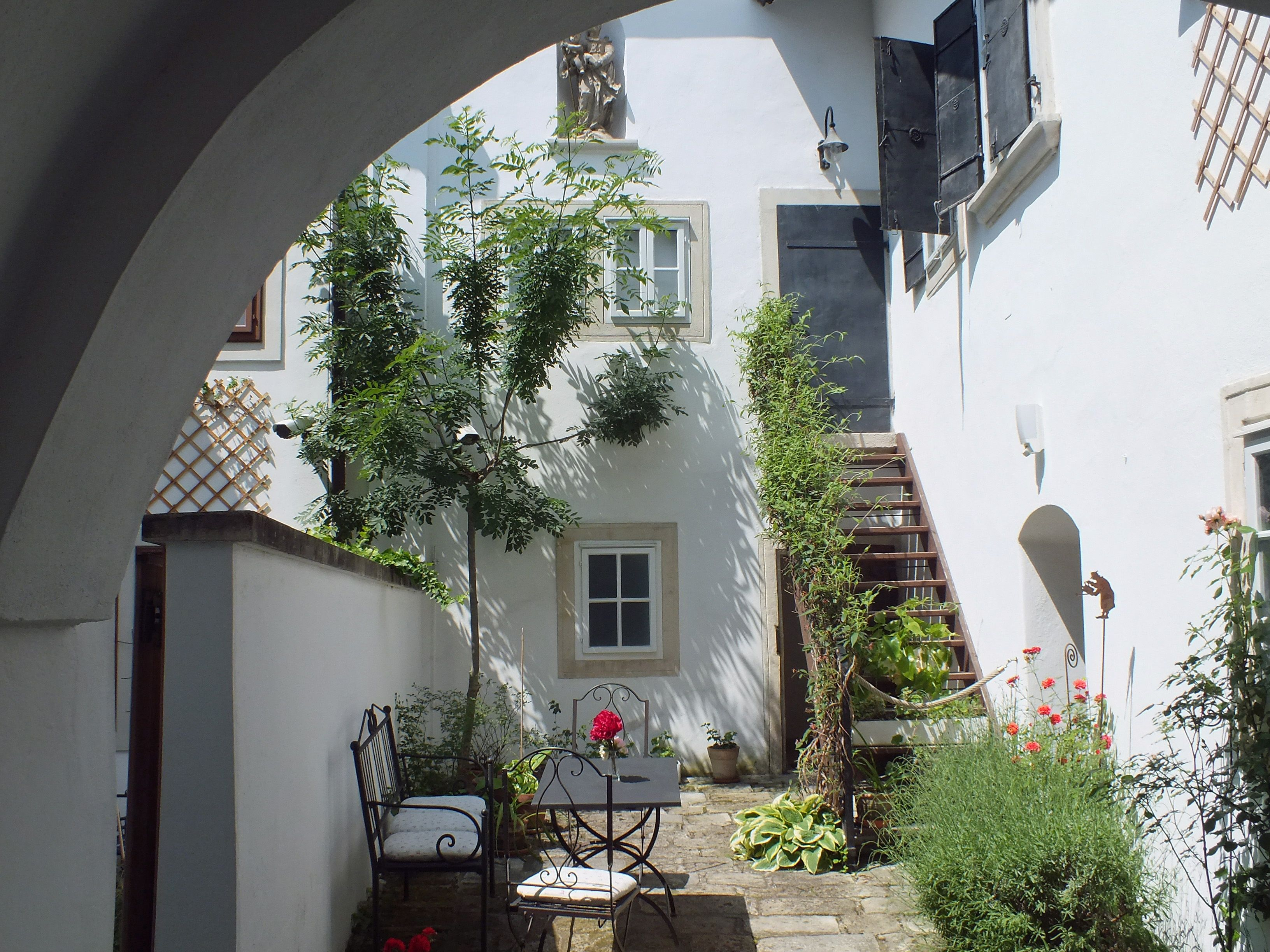 Der Hof auf dem Grundstück des Haydn-Hauses in Eisenstadt